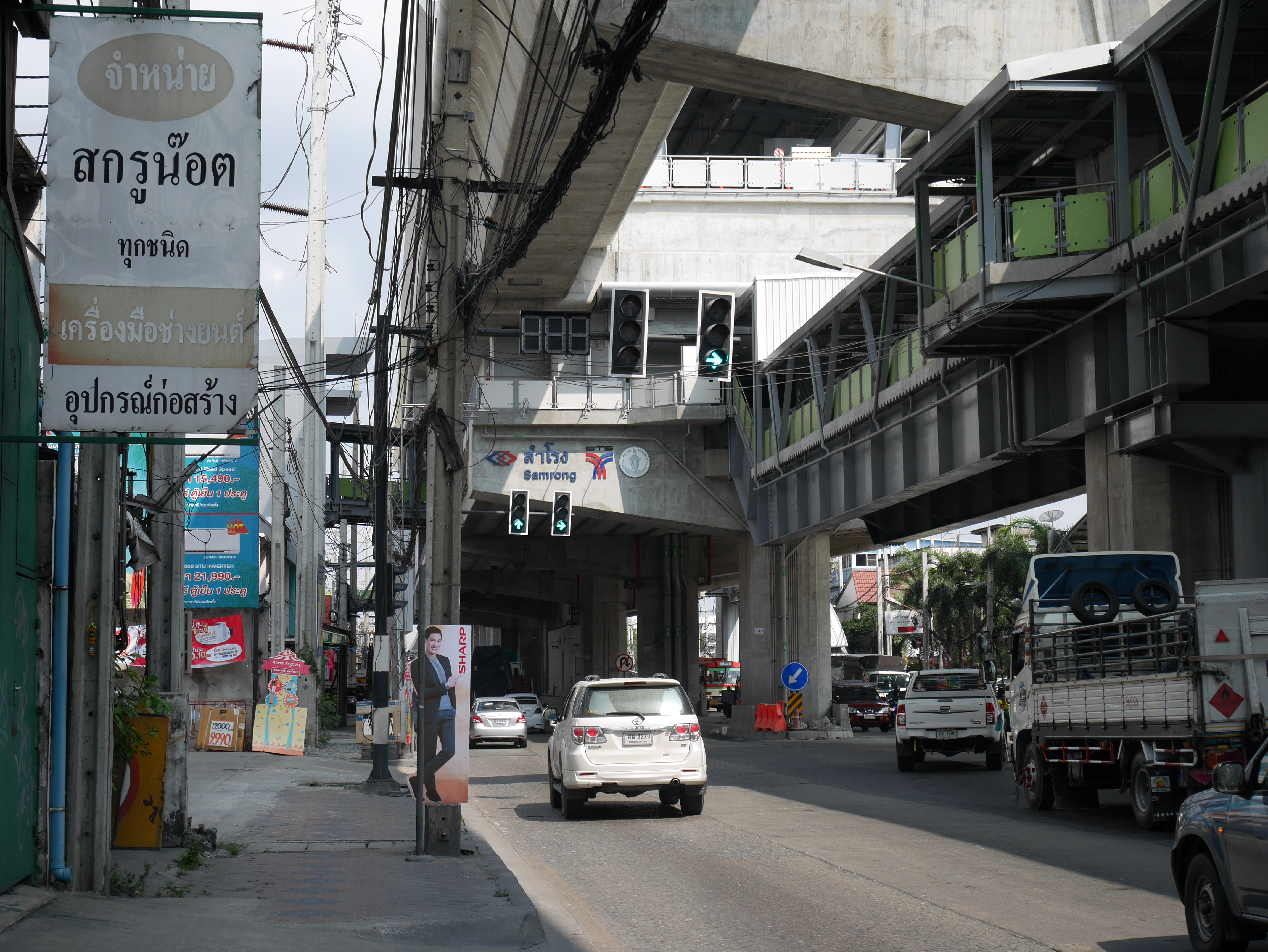 サムロン駅の外から撮影、その1